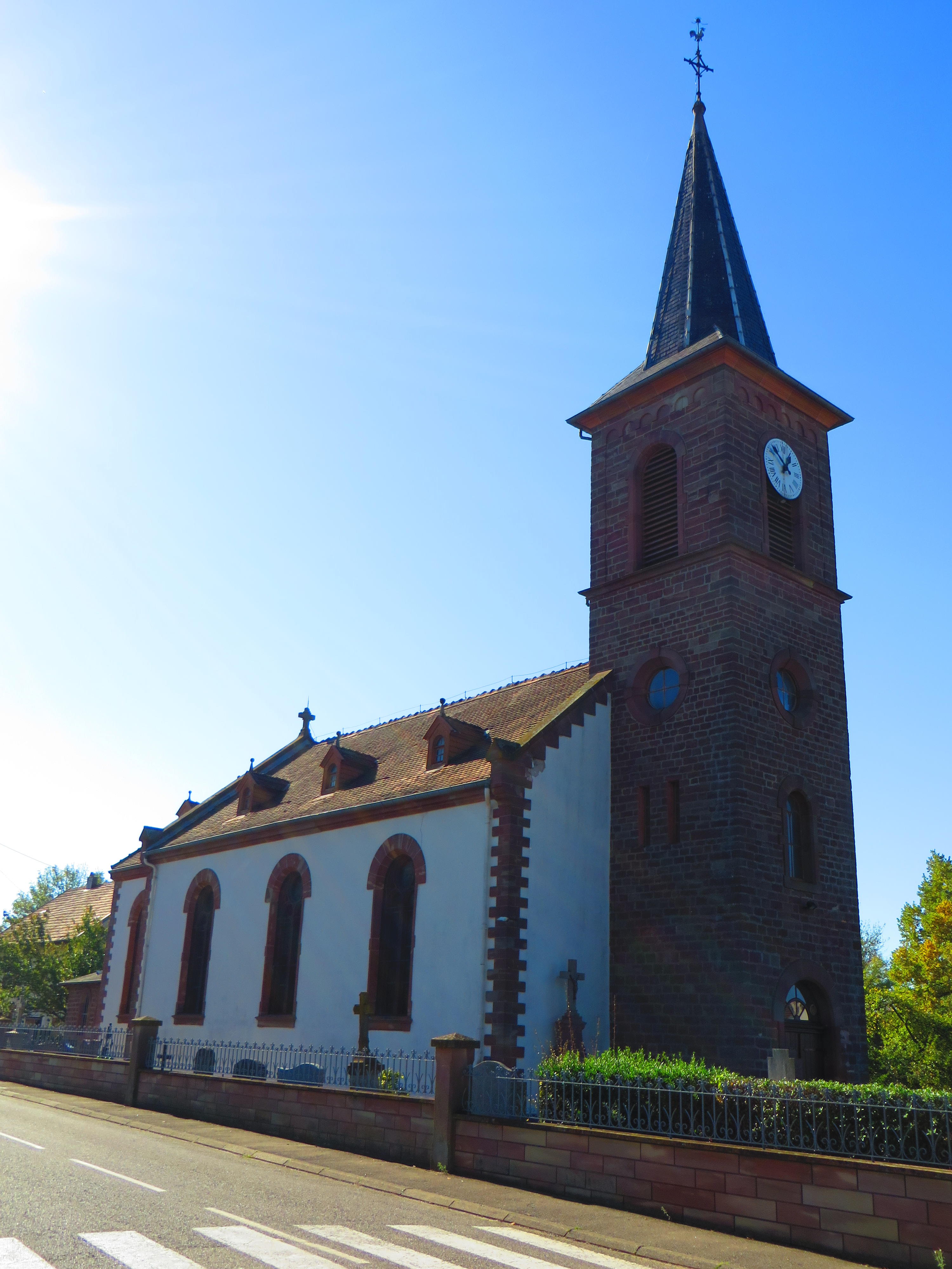 Schneckenbusch Église Notre-Dame